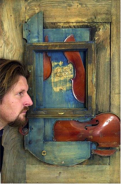 (Stekovics Gáspár egyik művével